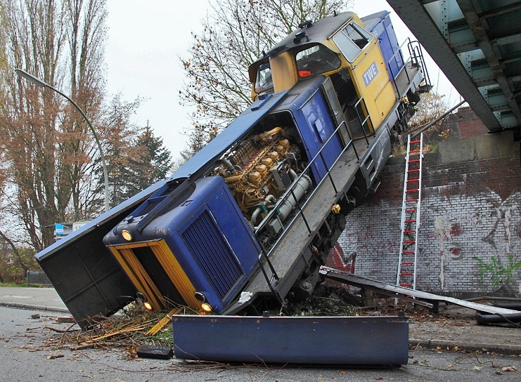 Unfall Lok V 131 Teutoburger Waldeisenbahn/TWE in Hamburg